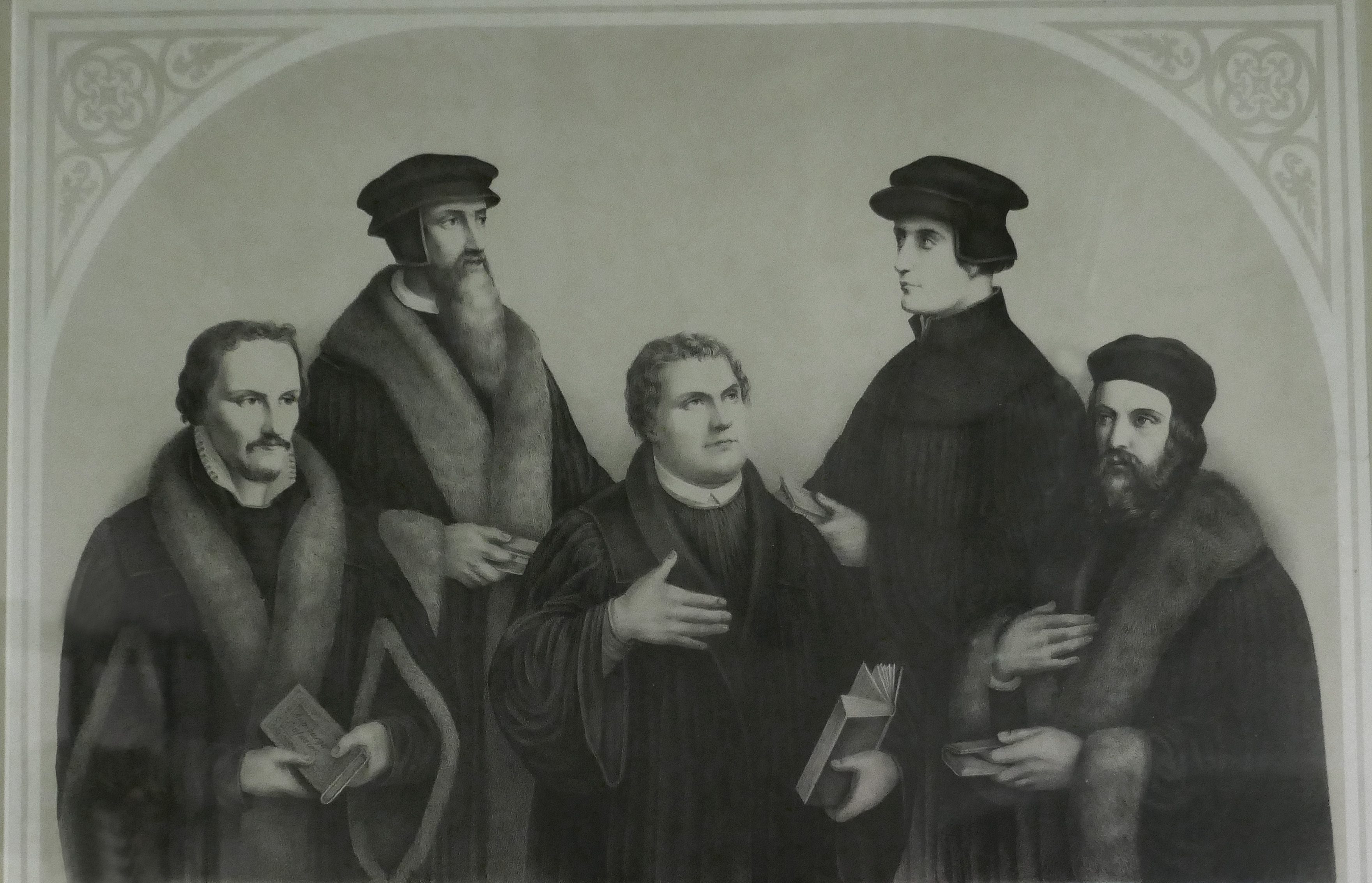 Les Cinq réformateurs (Melanchton, Calvin, Luther, Zwingli et Hus). Lithographie de Fr. Wentzel, Wissembourg, après 1855 (recadré). Exposition Vies protestantes : le mot et l'image au Musée alsacien de Strasbourg (2017).